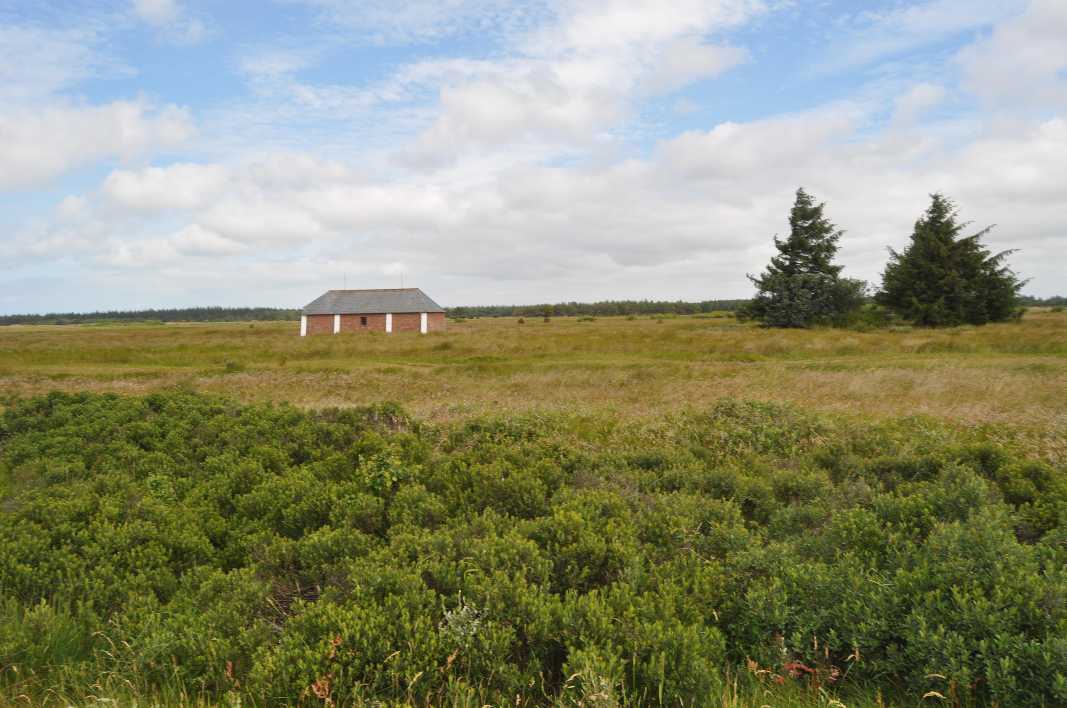 Truppenübungsplatz mit vermauerten Gebäuden des alten Vejers